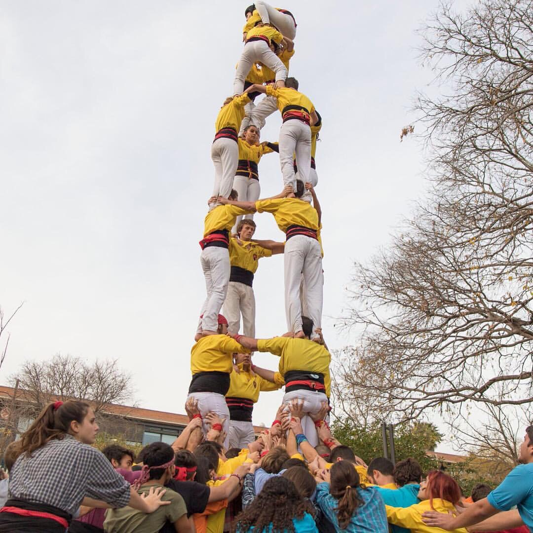 Primer 4 de 7 (i primer castell de 7 pisos) descarregat pels Engrescats de la URL. Assolit al primer intent el 17 de desembre del 2015 a la II Diada d'Hivern dels Engrescats de la URL.